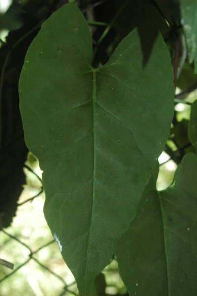 Fallopia multiflora leaf